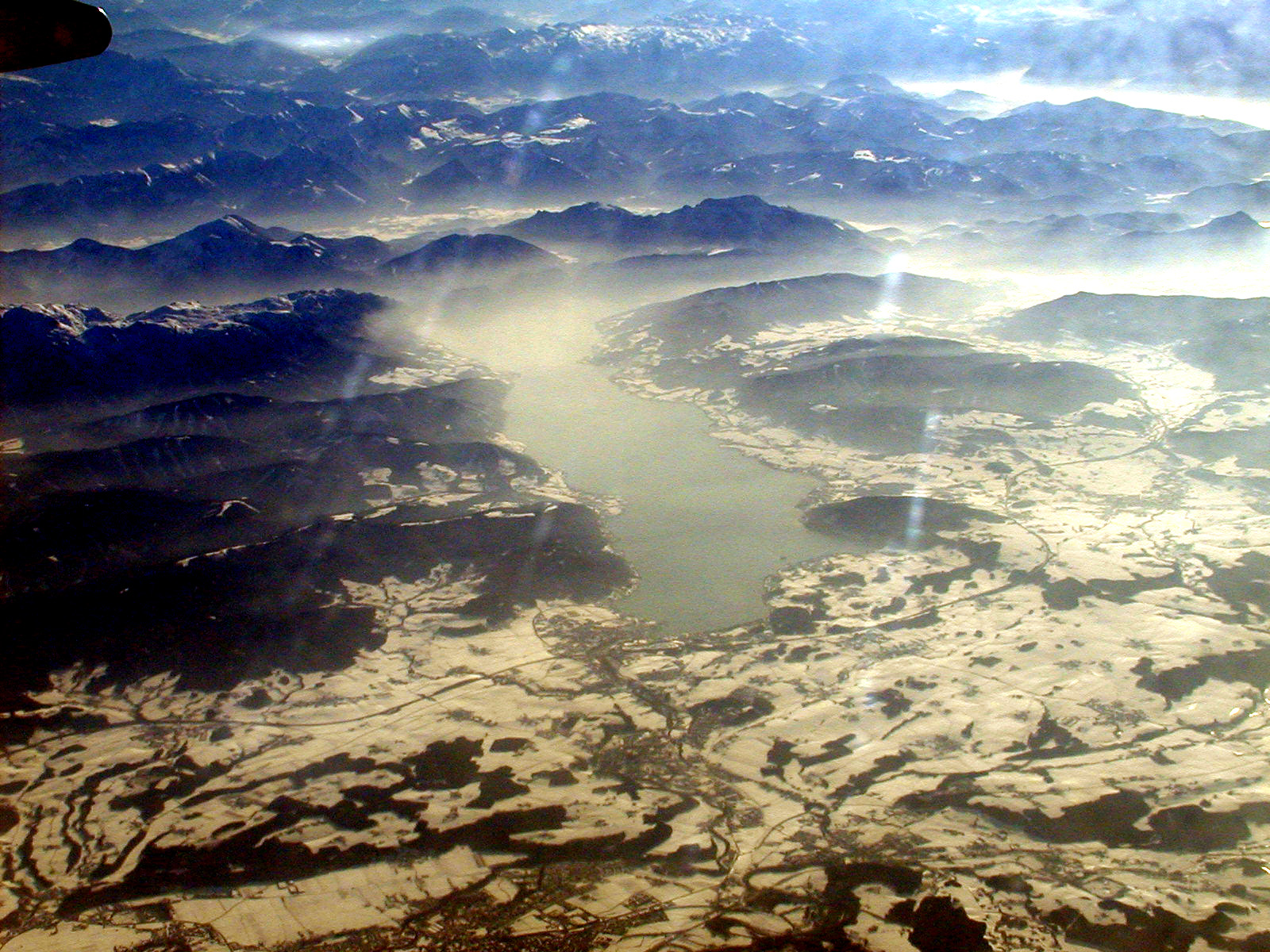 Attersee-Salzkammergut-Februar-2004- aus ca 9000m Höhe